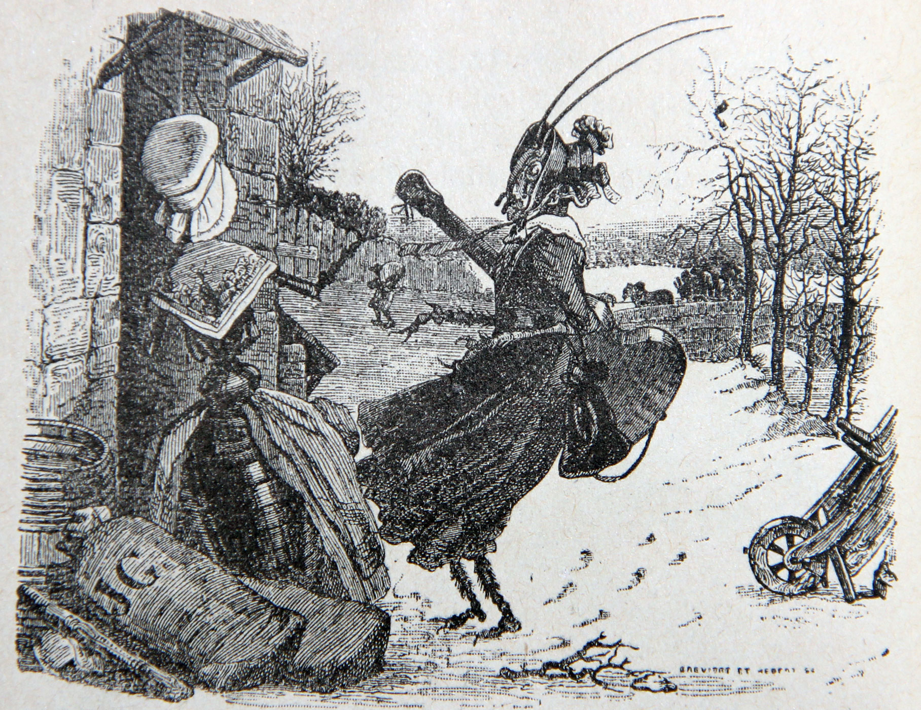 Illustration de Grandville pour La Cigale et la Fourmi (La Fontaine, I,1)